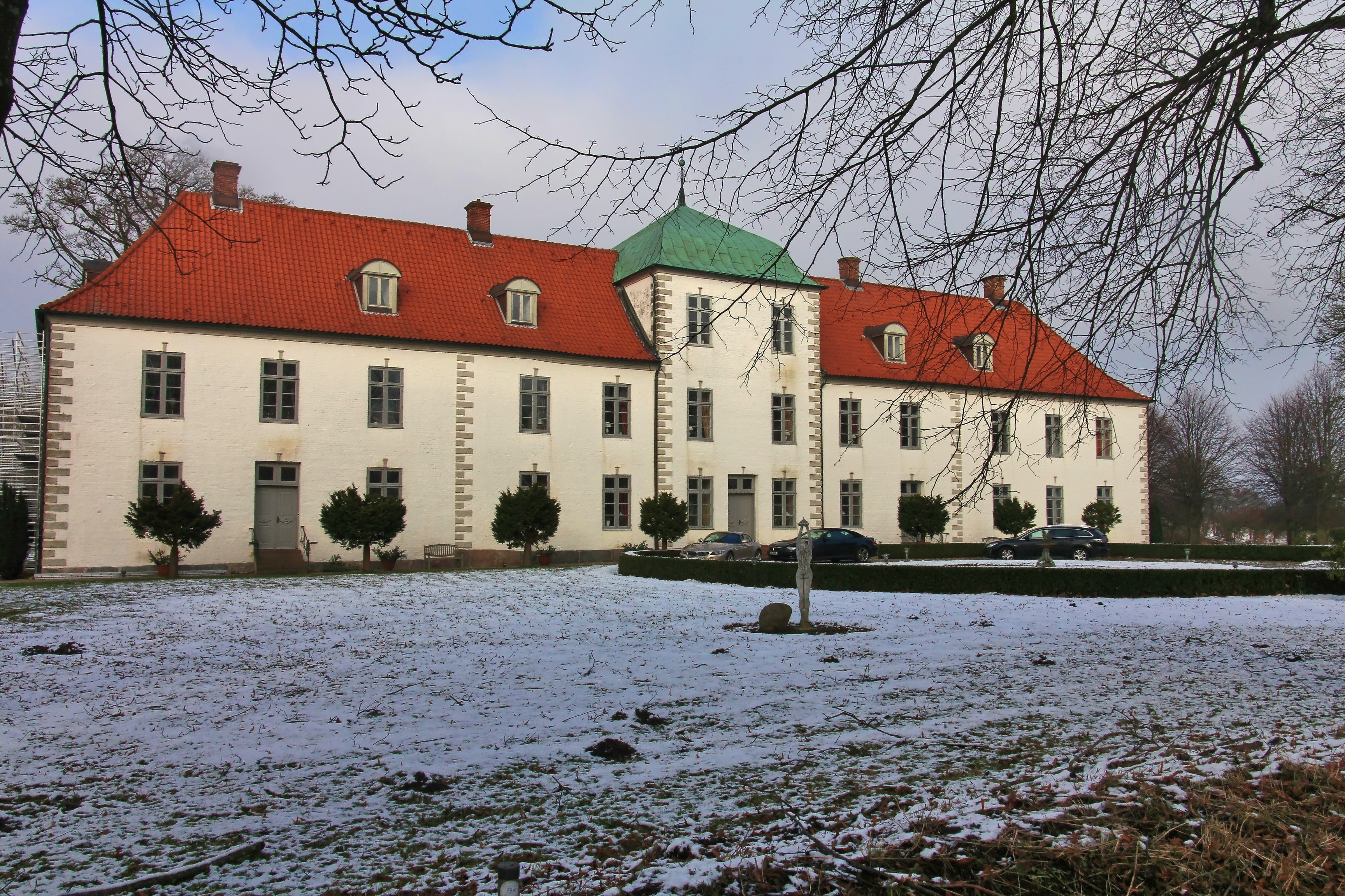 Winnemark, Herrenhaus Karlsburg; Eingangseite